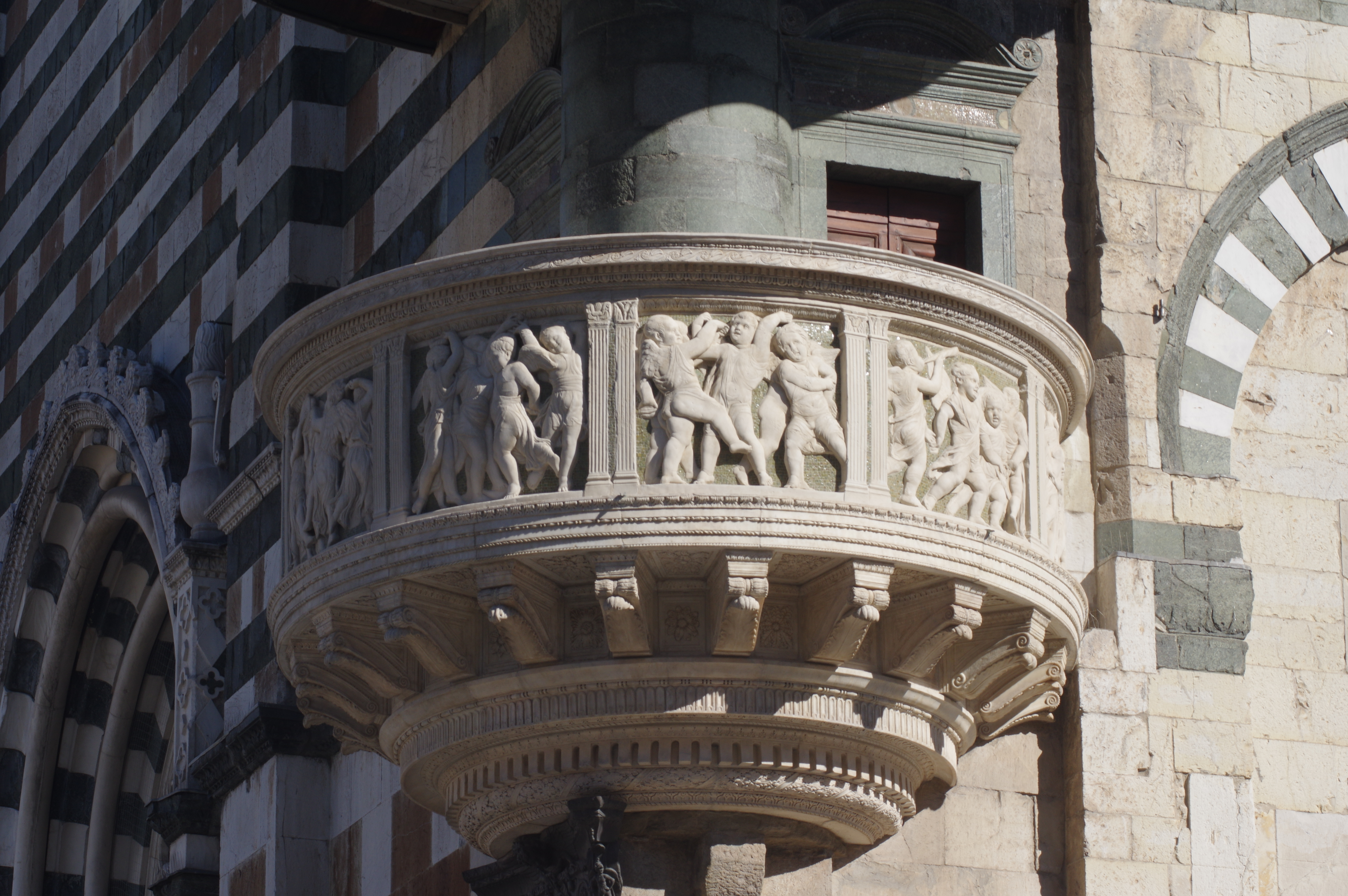 Il Pulpito di Donatello, Duomo di Prato